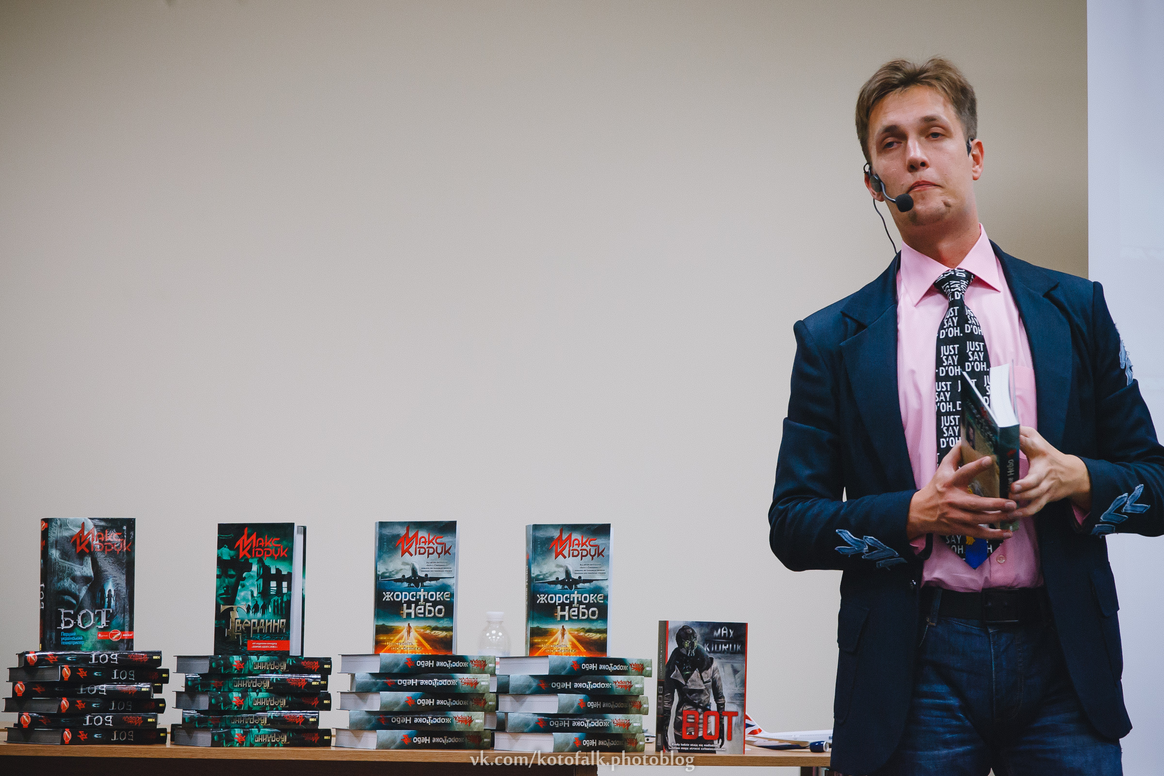 Max Kidruk. Lviv